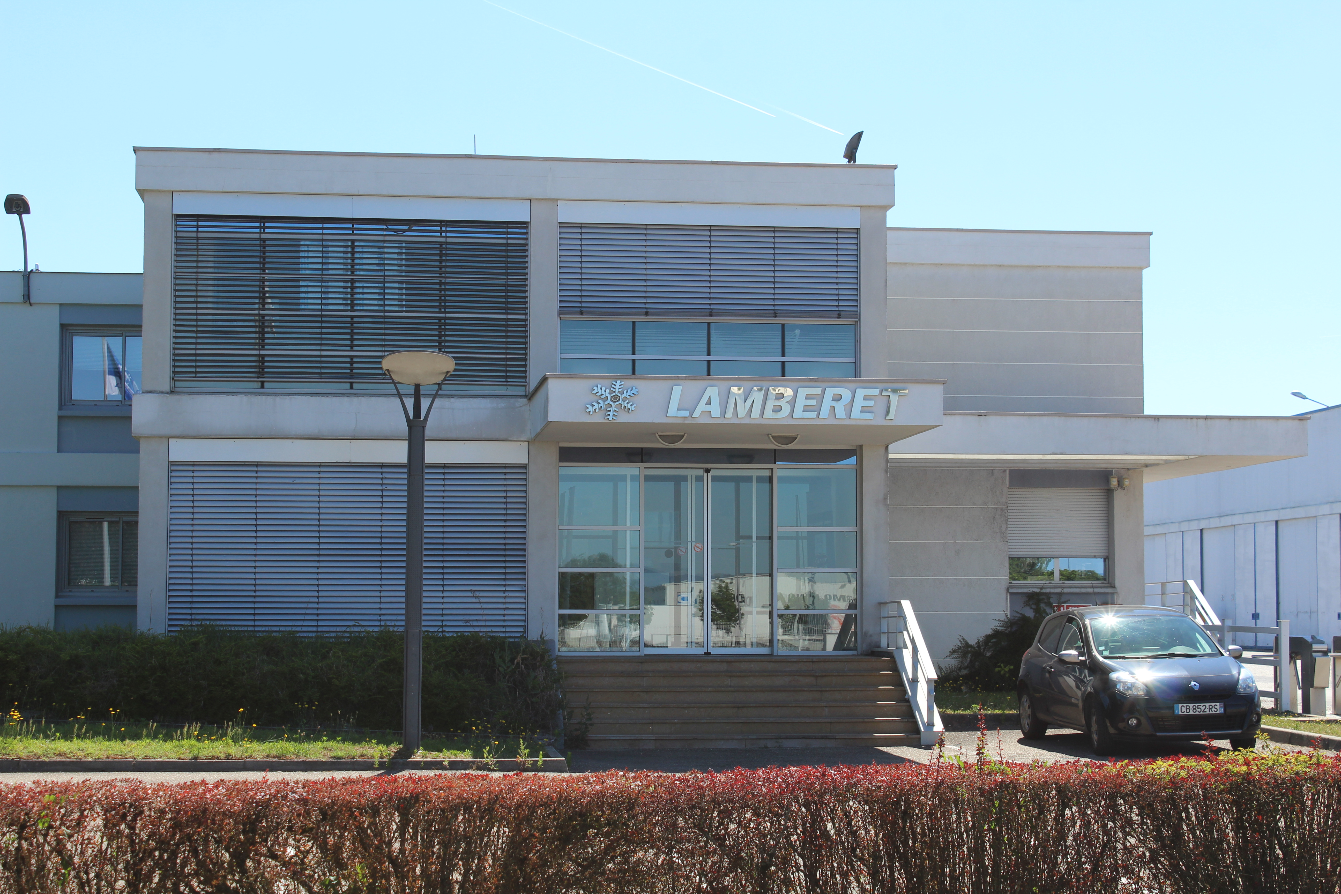 L'entreprise Lamberet, Saint-Cyr-sur-Menthon.